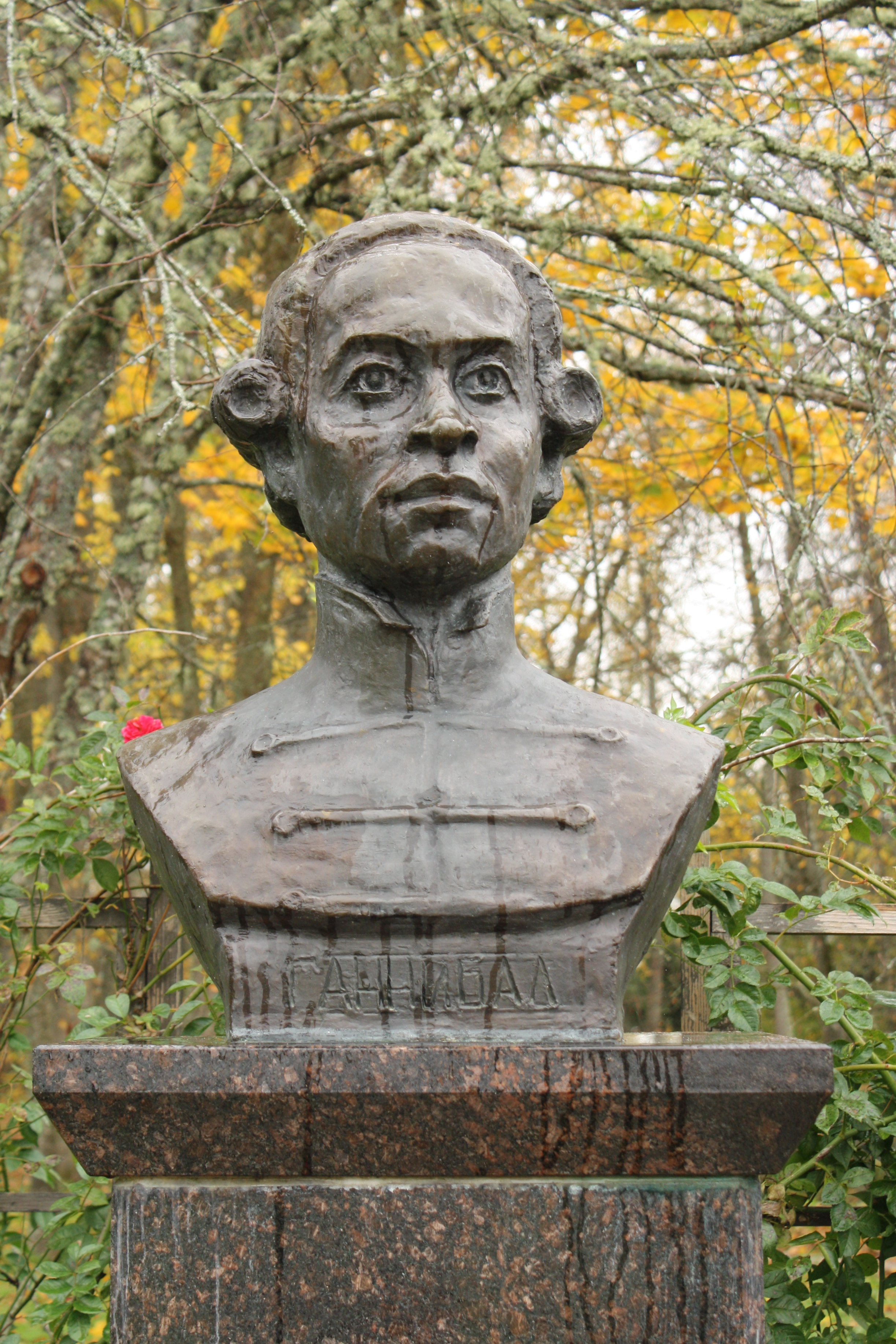 Петровский парк